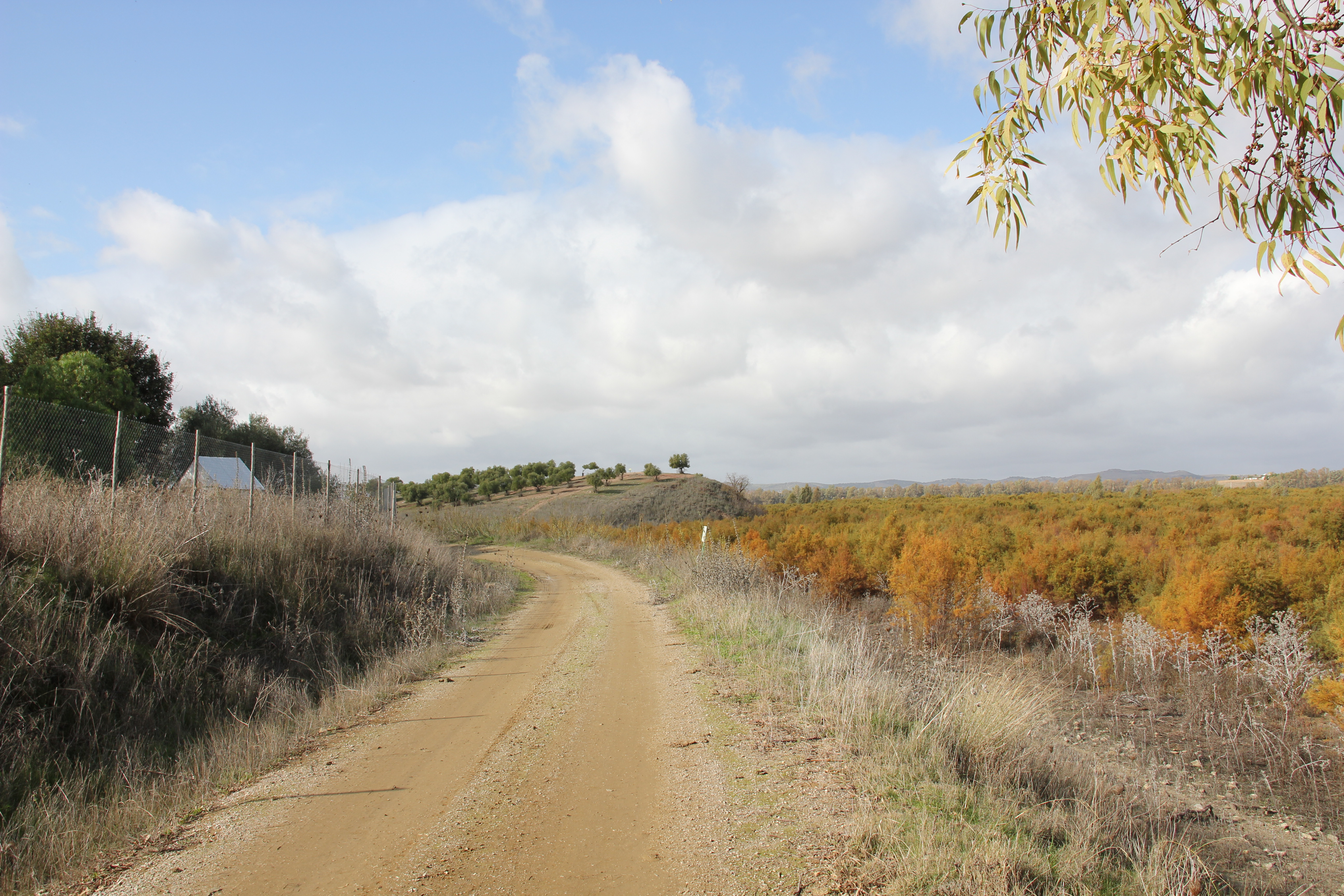 Sendero cola del embalse de Bornos (Andalucía, España)